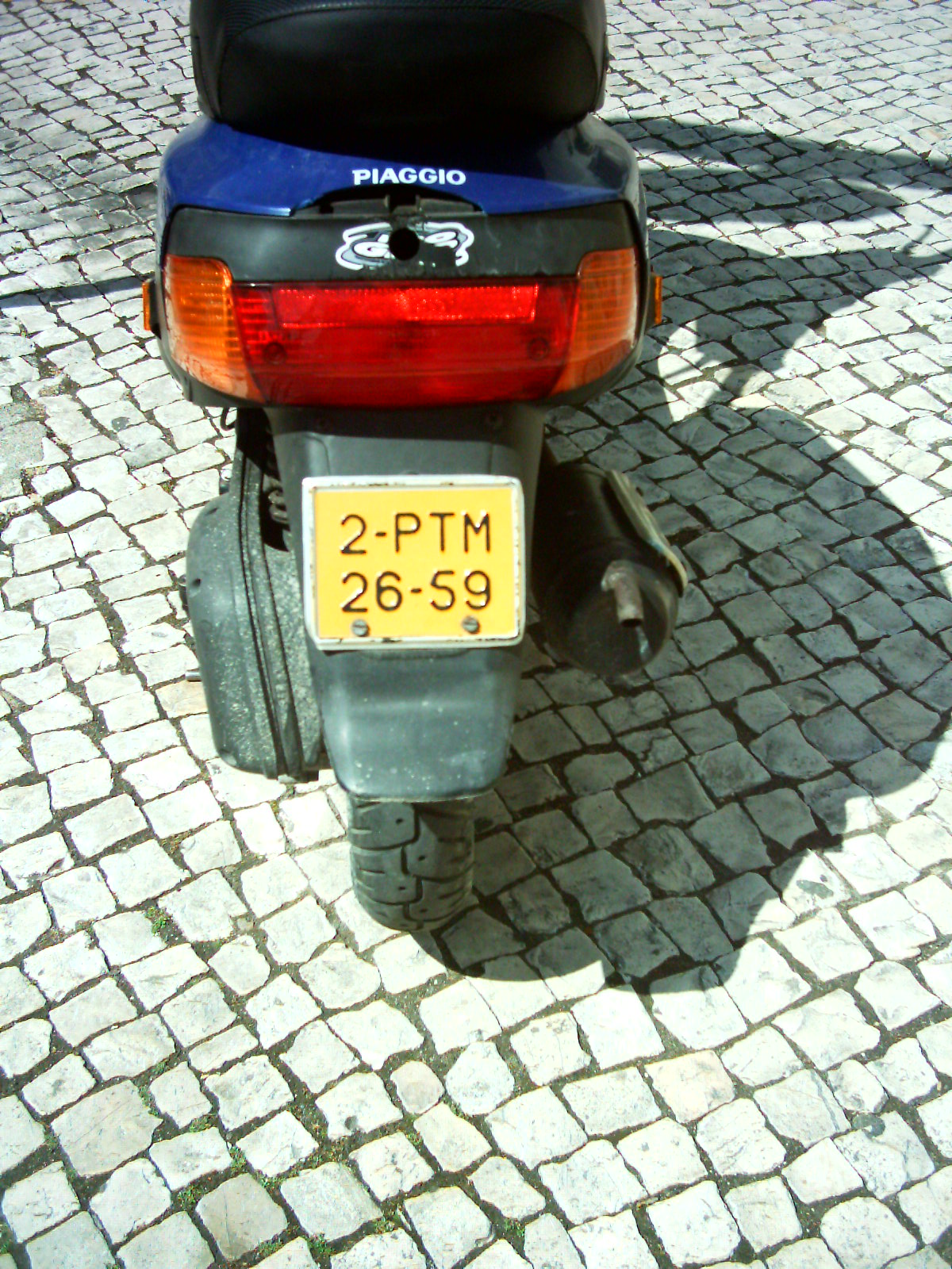 Matrícula de motociclo, Portimão (2-PTM / 26-59); calçada à portuguesa